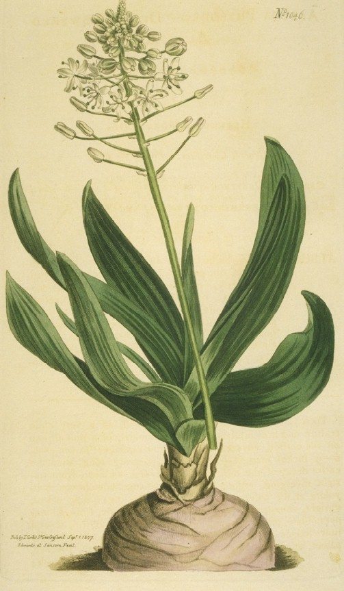 Fusifilum physodes